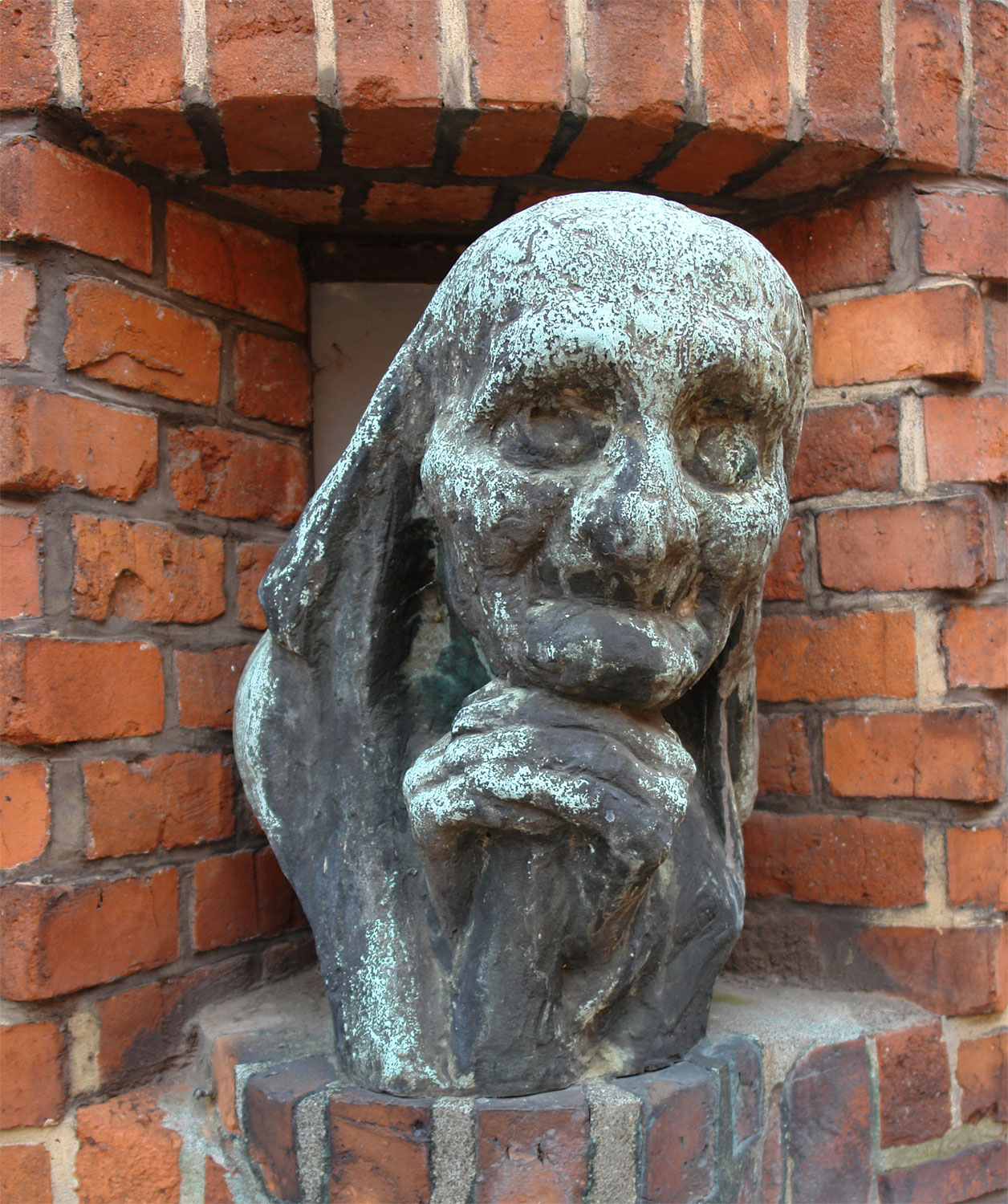 Bernhard Hoetger: Moorfrau (1924, Bronze). Standort: Bremen, Paula-Becker-Modersohn-Haus (Terrasse) Das abgebildete Objekt ist ein geschütztes Kulturdenkmal in der Freien Hansestadt Bremen, mit der Nr. 1503,T002 beim Landesamt für Denkmalpflege registriert.